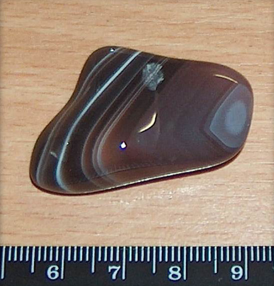 agat wstegowy, grudka; autor zdjęcia Grzegorz Framski